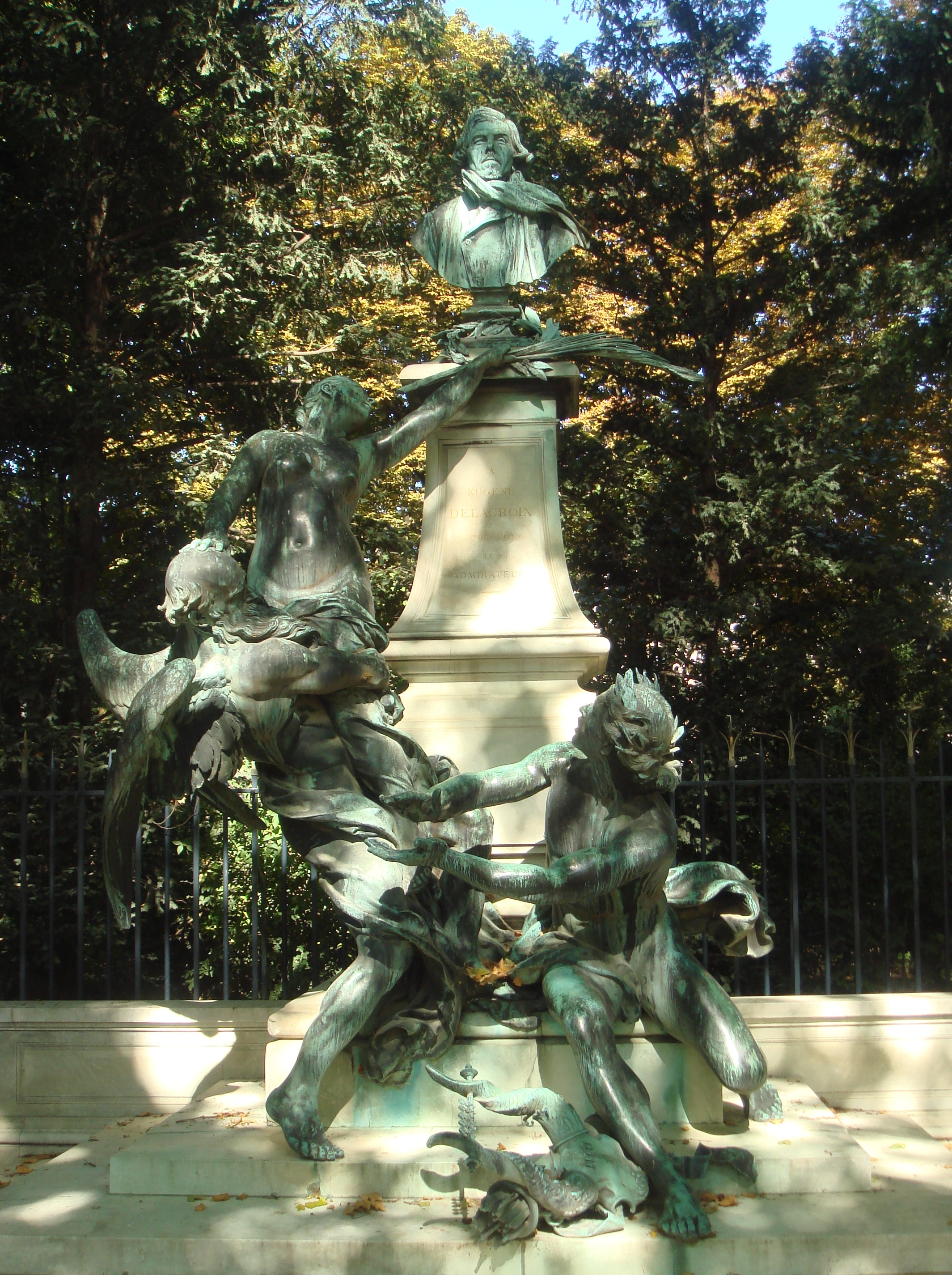 Aimé-Jules Dalou (Français, 1838-1902): Hommage à Eugène Delacroix (inauguré 1890), bronze, Paris, Jardin du Luxembourg.